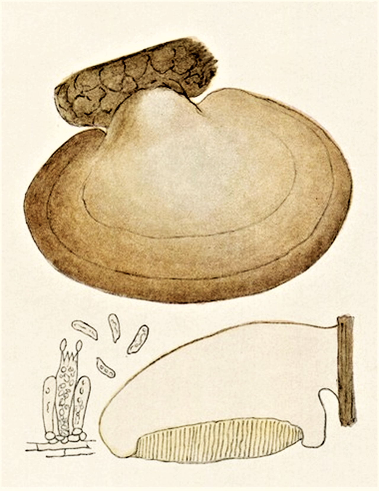 Bres.: Polyporus betulinus (Bull., 1787) Fr. (1821), heute Piptoporus betulinus (Bull.) P.Karst. (1881), auch Fomitopsis betulina (Bull.) B.K.Cui, M.L.Han & Y.C.Dai (2016)